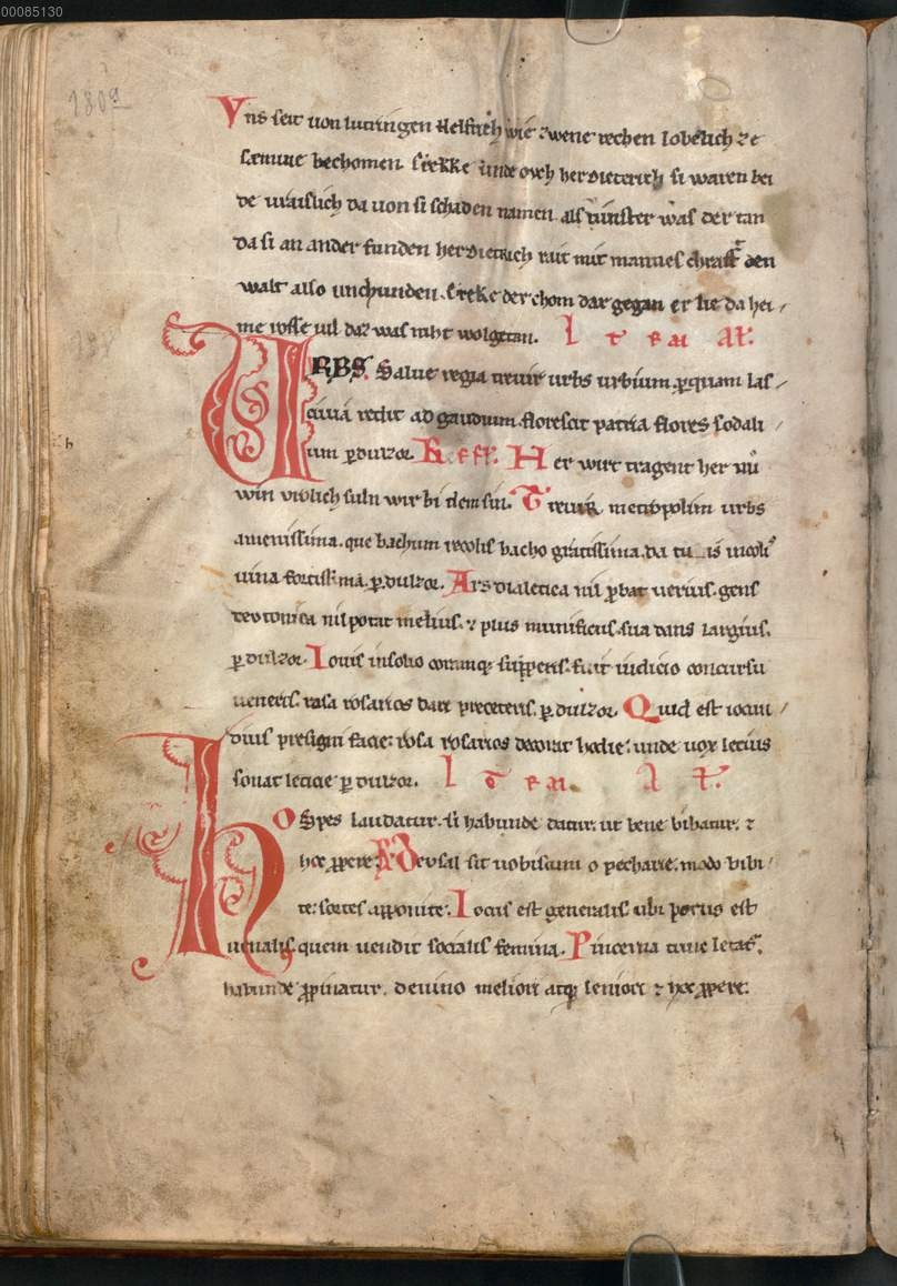 Eckenlied-Strophe im Codex Buranus. BSB Clm 4660 fol. 90v.